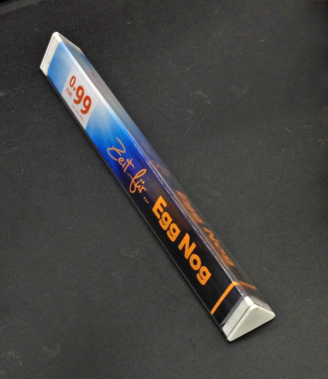 Customer divider bar